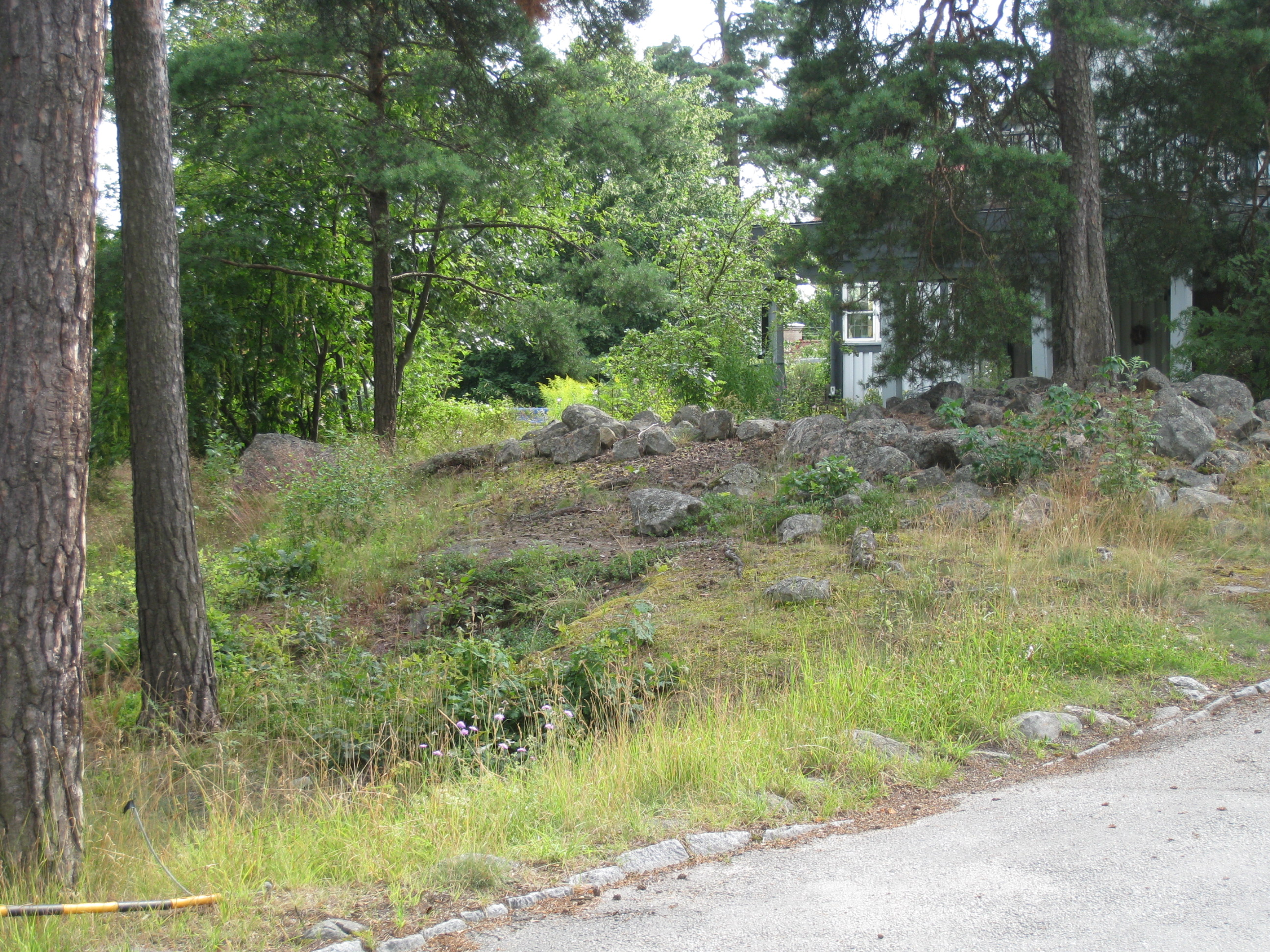 Bronsåldersgravfält RAÄ4 vid Kämpakumlet på Aladdinsvägen 32 inom Smedslättens område i Bromma väster om Stockholm.